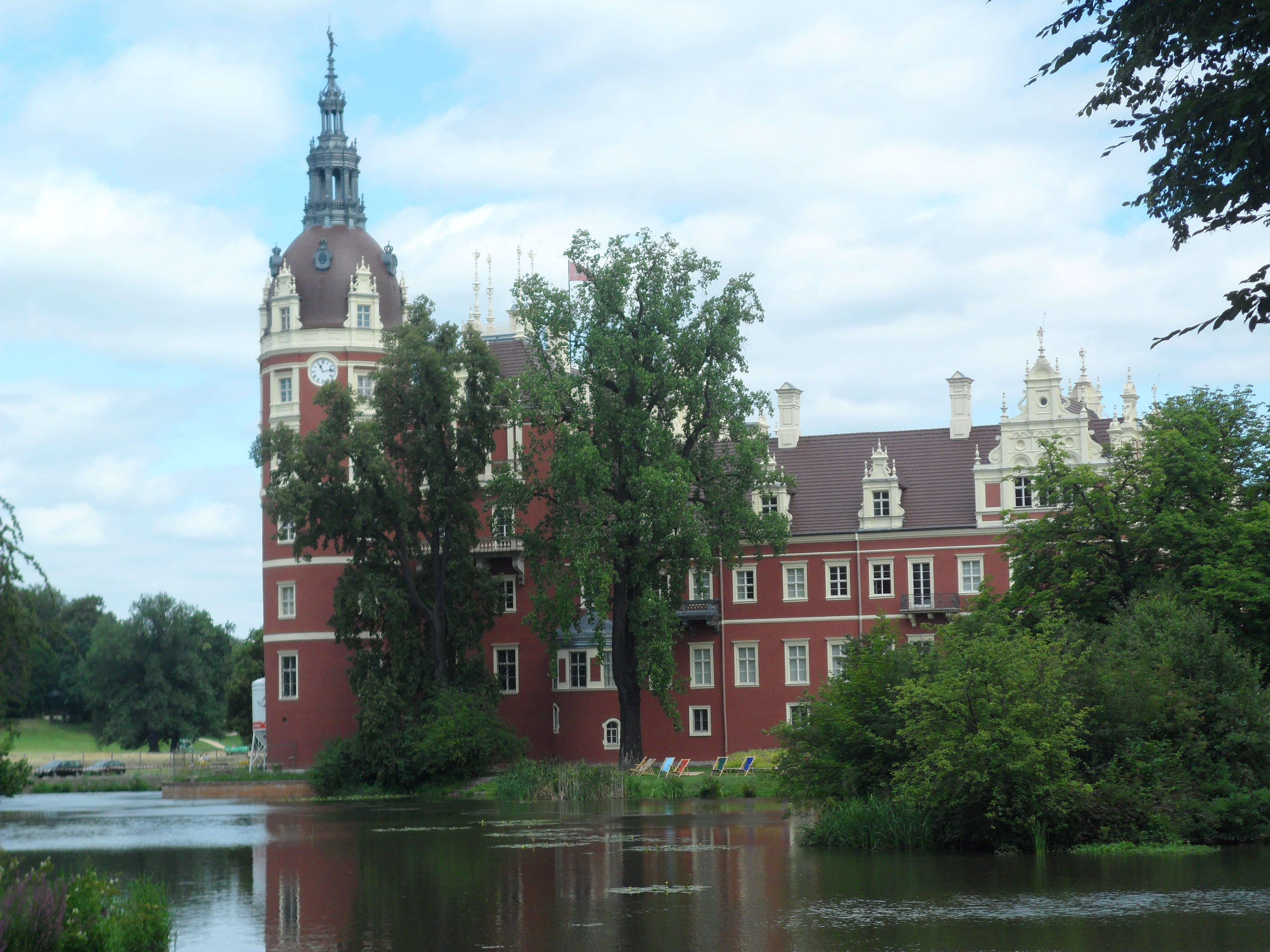 Neues Schloss im Fürst-Pückler-Park Bad Muskau. Date and/or time in the file Exif metadata are incorrect/invalid.